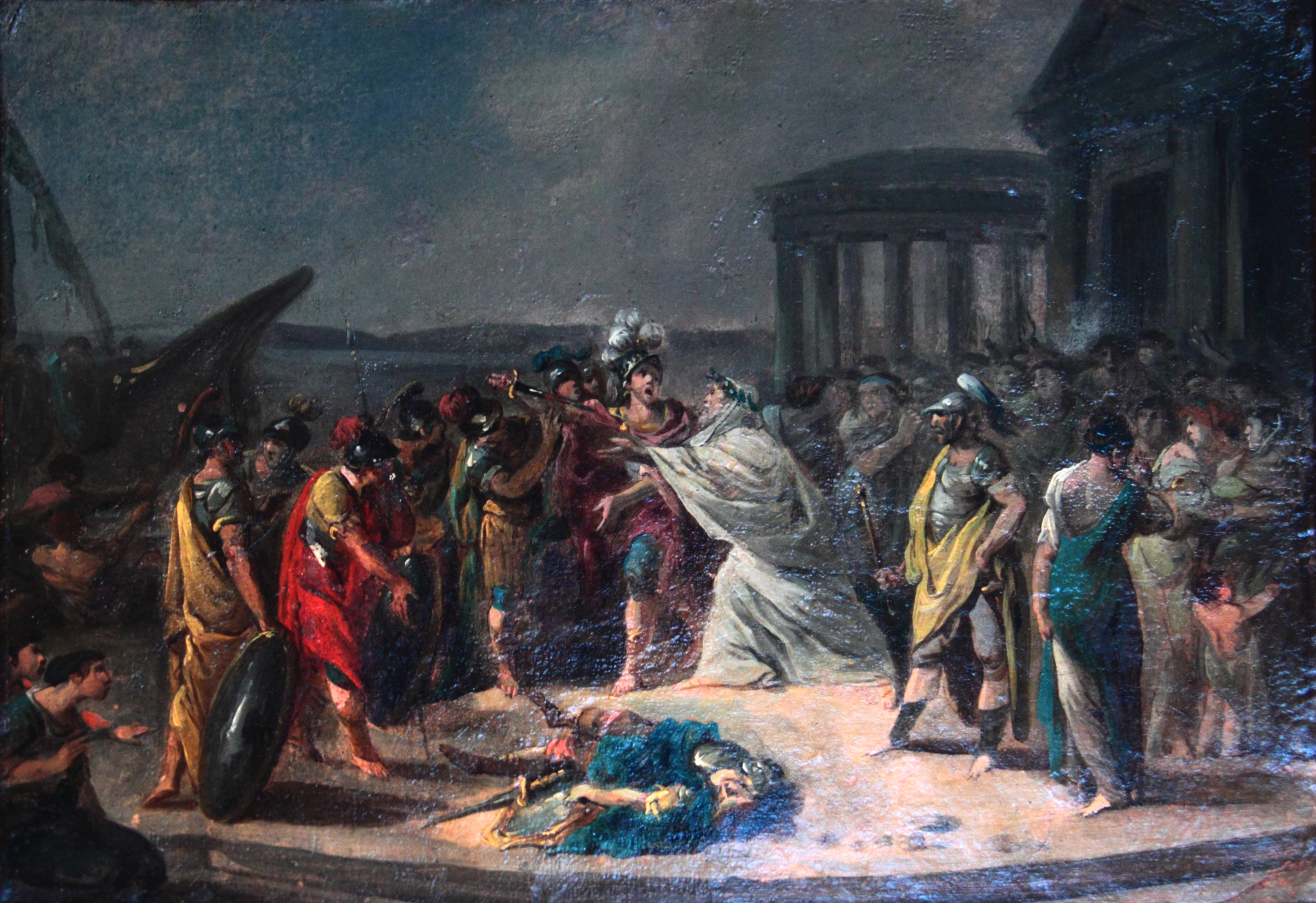 Le retour d'Idomédée, oeuvre de Gamelin, Musée des Augustins Palais Niel, Toulouse